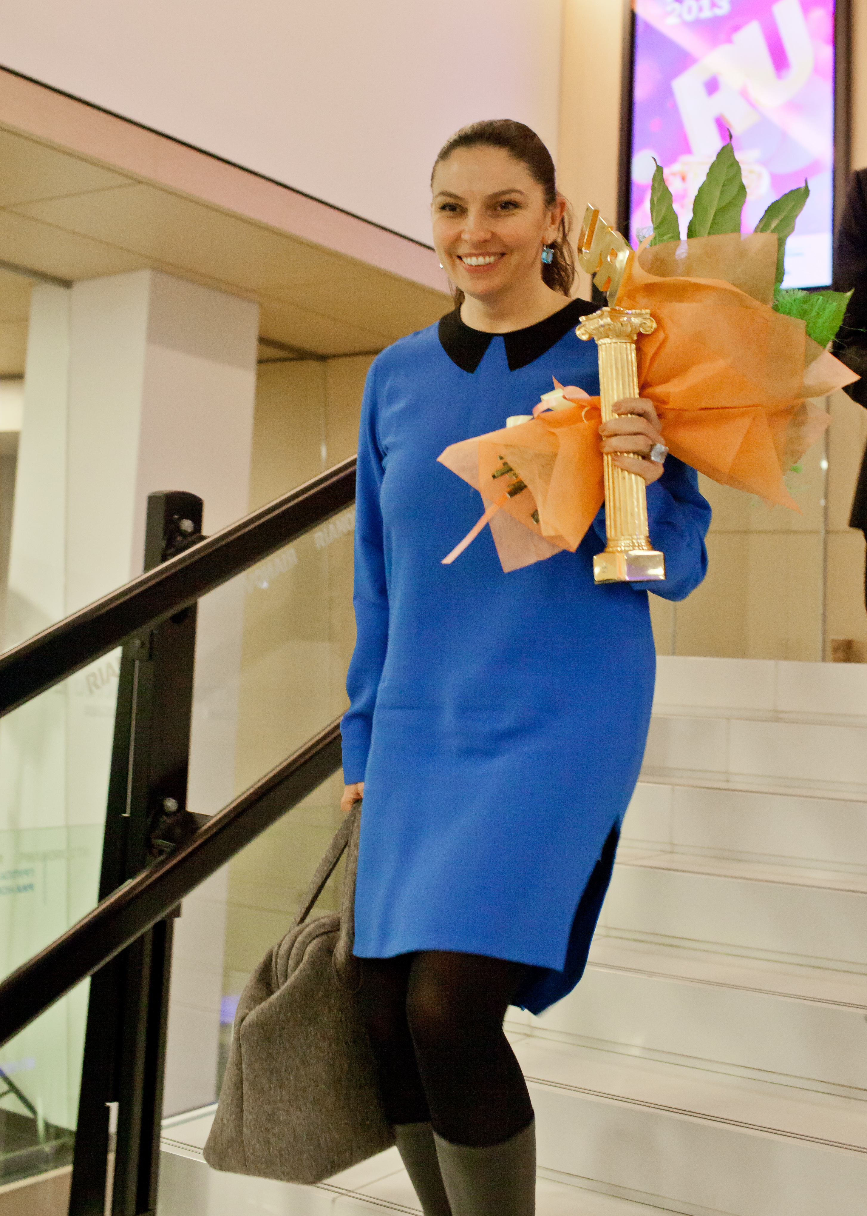 Церемония вручения Премии Рунета за 2013 год. Москва, РИА Новости